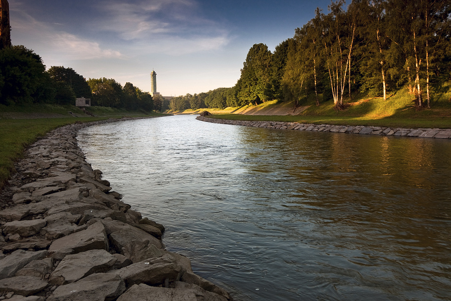 Řeka Ostravice, nábřeží s novou radnicí